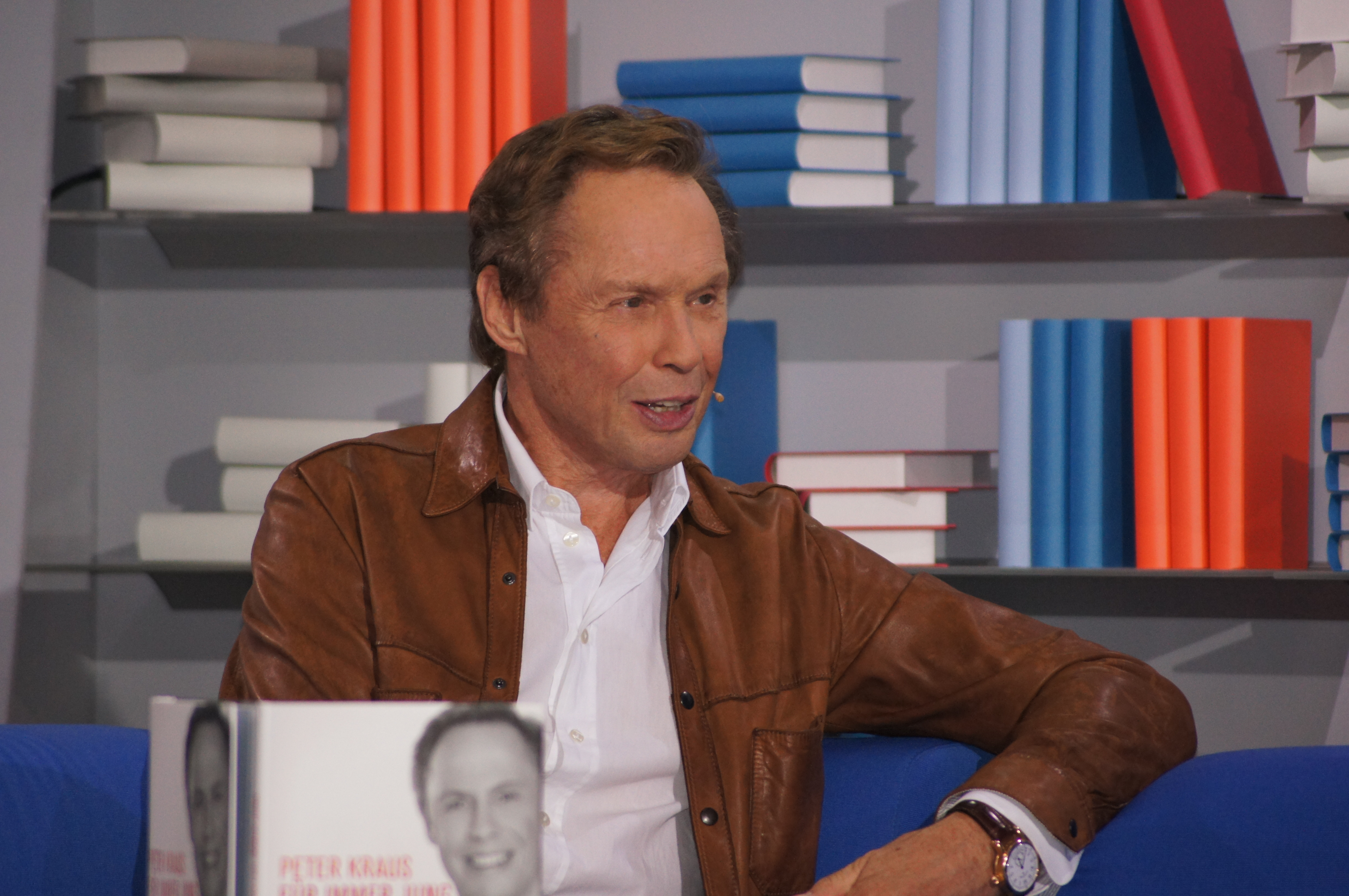 Peter Kraus. Dieses Fotos dürfen Sie honorarfrei nutzen, wenn Sie folgenden credit beachten: Copyright: Das blaue Sofa / Club Bertelsmann.